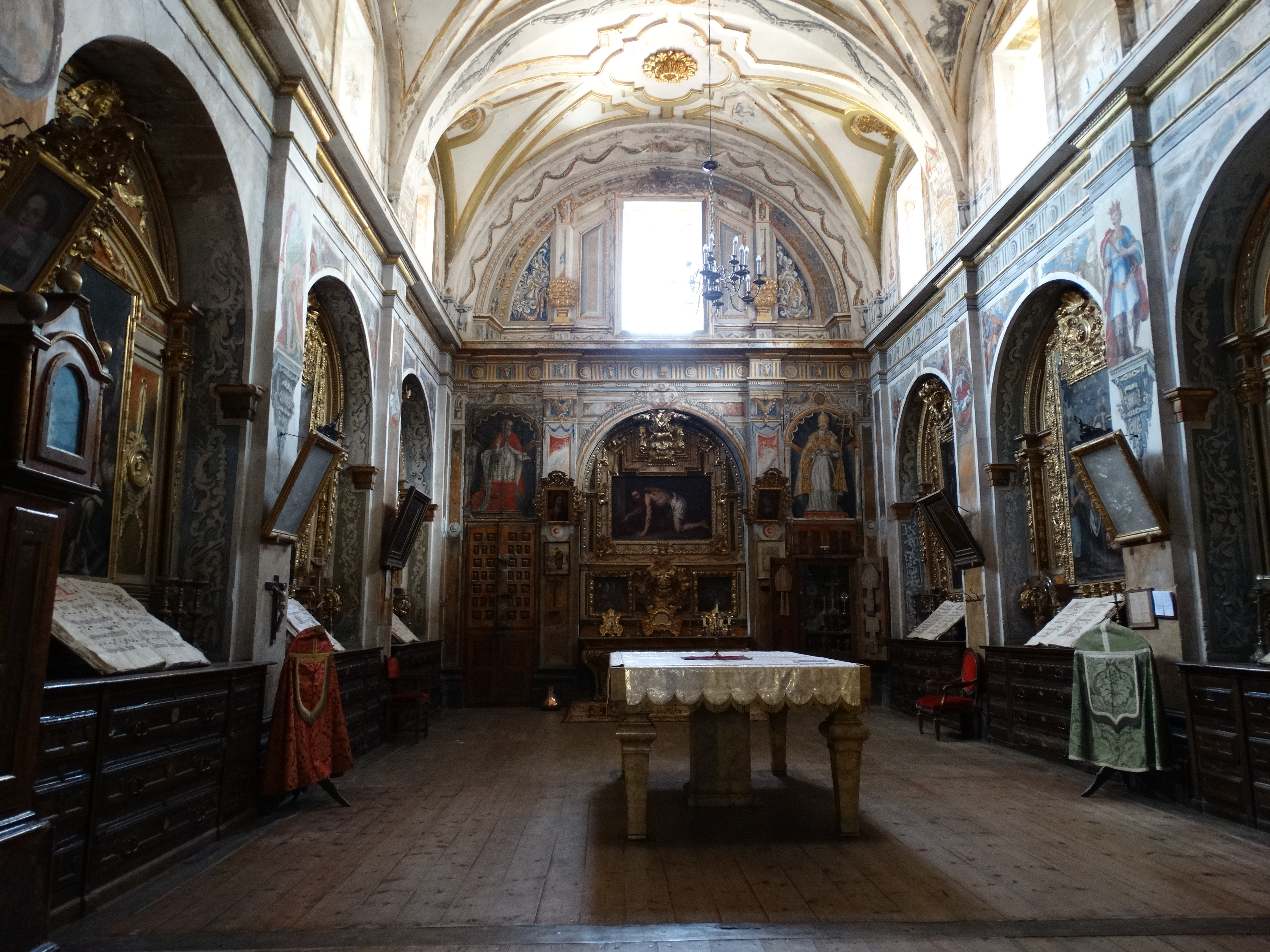 Iglesia de Nuestra Señora de la Asunción en Briones, La Rioja (España). Sacristía. Decoración al fresco con gran Asunción de la Virgen. Magnífica cajonería de fines del XVI y otra barroca del XVIII. Lienzos en las paredes. En el retablo del fondo se ve el cristo tras la fragelación del siglo XVII.